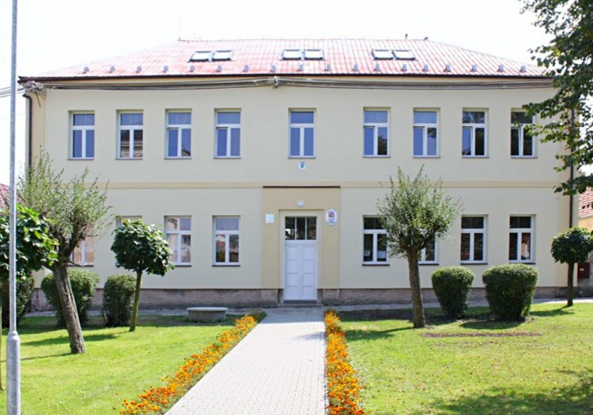 Základní škola v Bílém Podolí